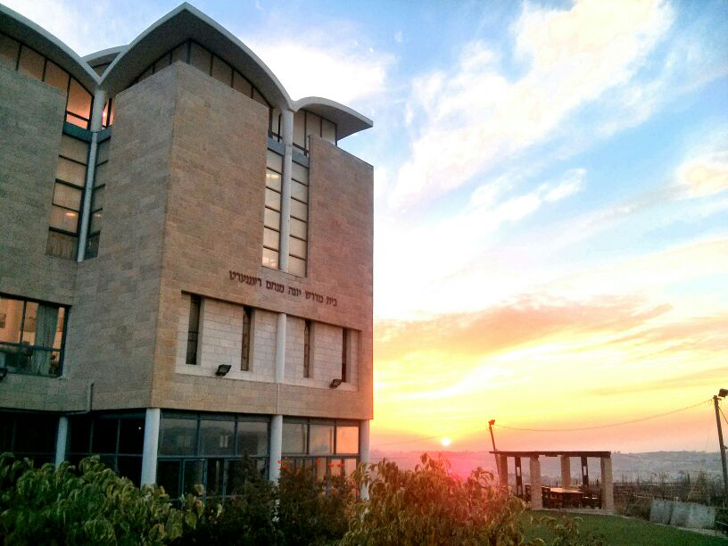 ישיבת עתניאל בשעת שקיעה במבט מהחזית.